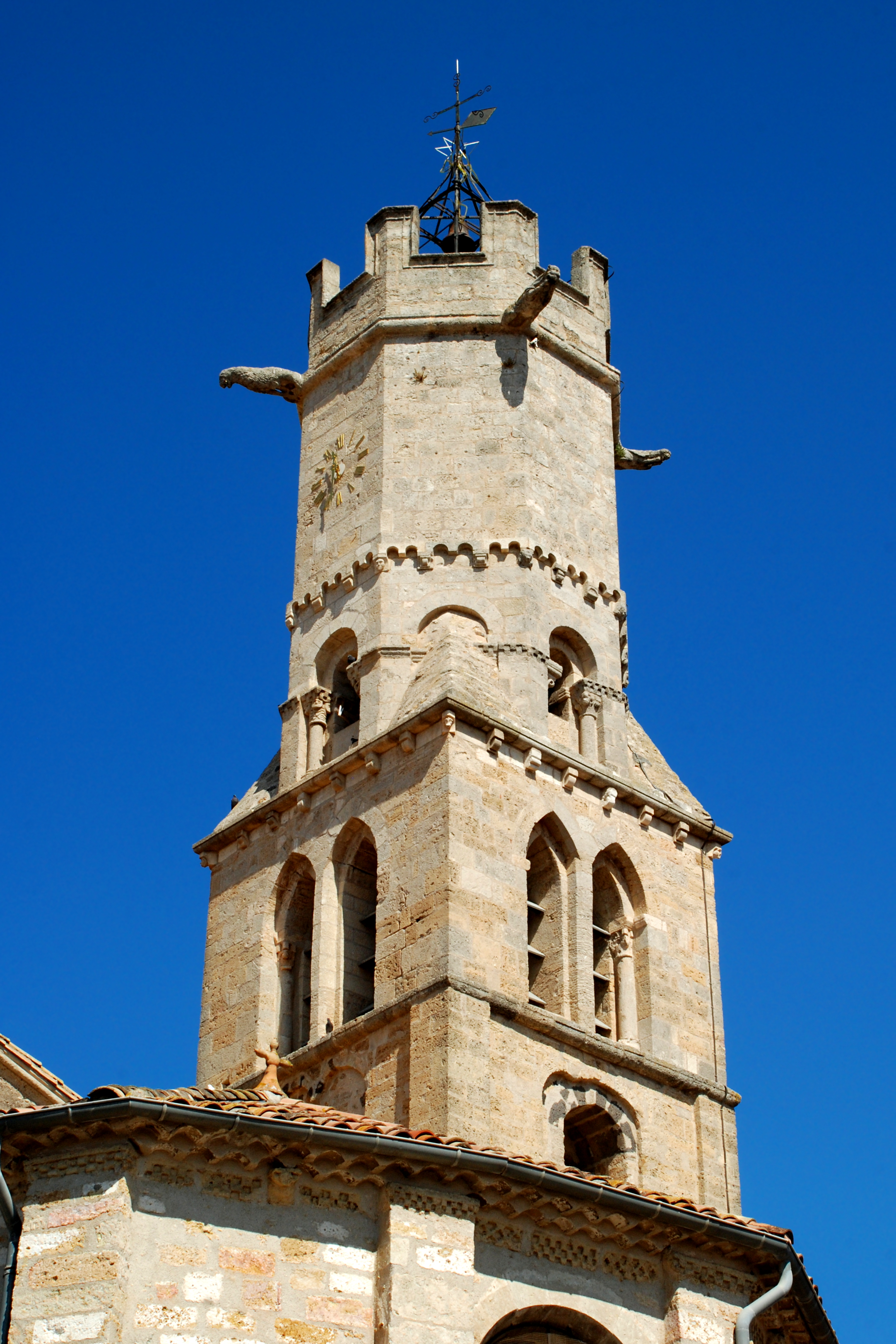 France - Languedoc - Hérault - Villeneuve-lès-Béziers - église de l'Invention-de-Saint-Étienne